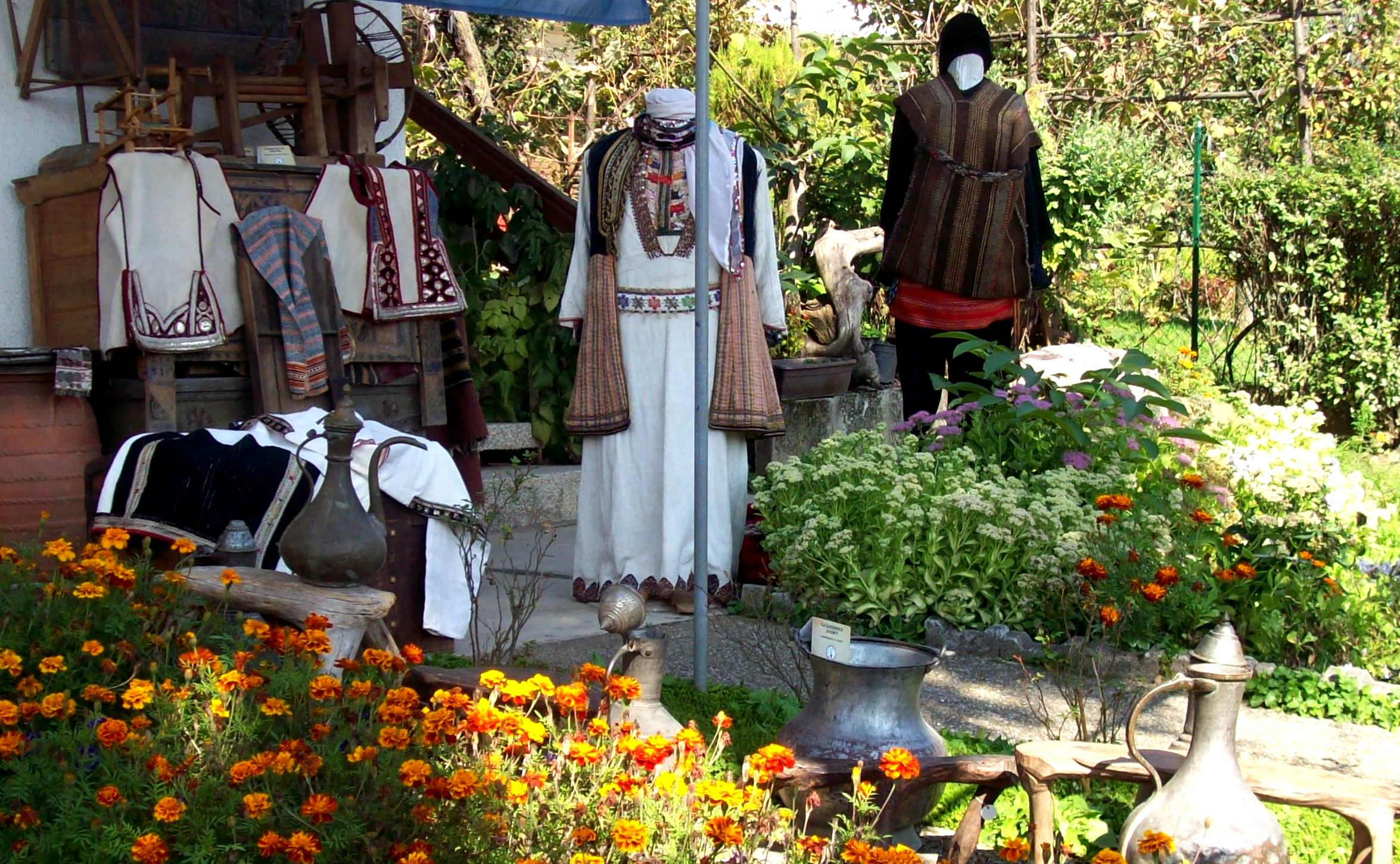 Tradicionalni narodni nosii vo Najmaliot etnoloshki muzej na svetot - Dzepchishte, Tetovo